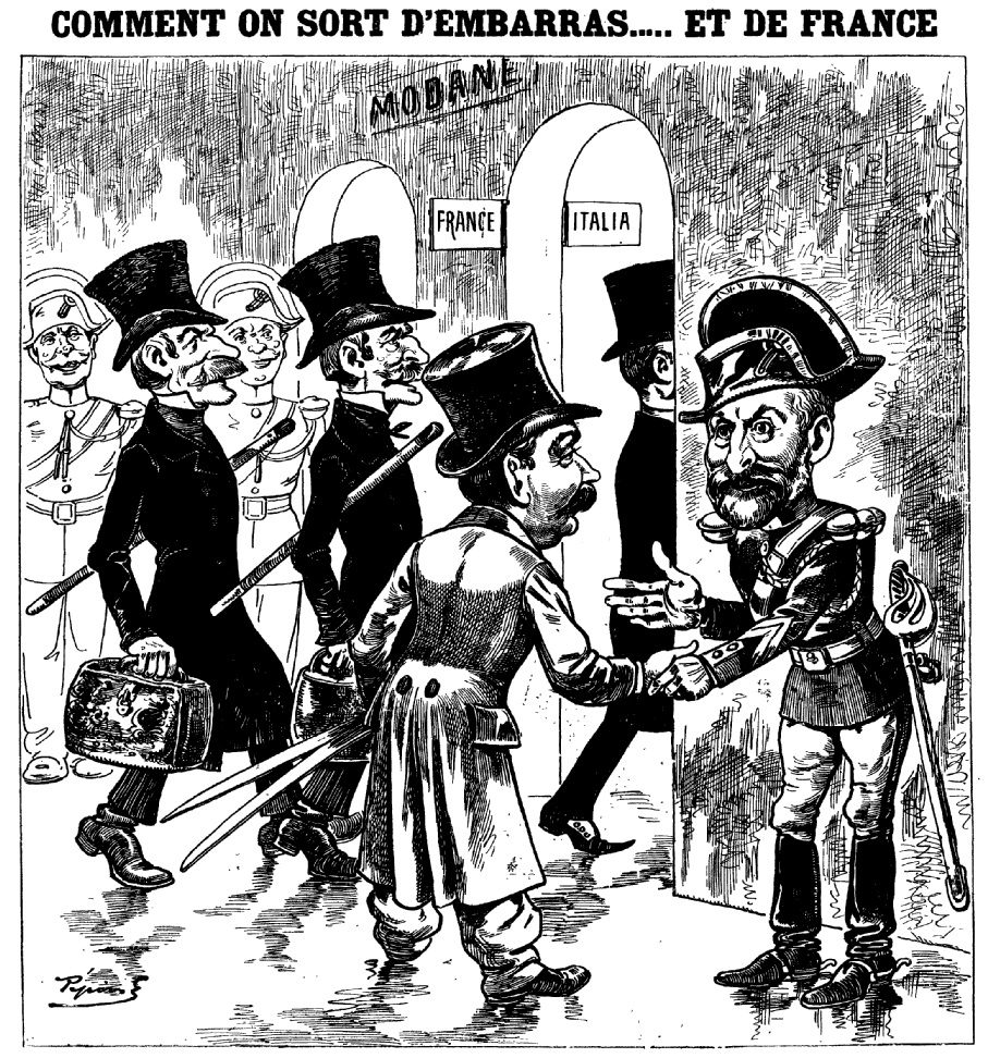 "Comment on sort d'embarras ... et de France".